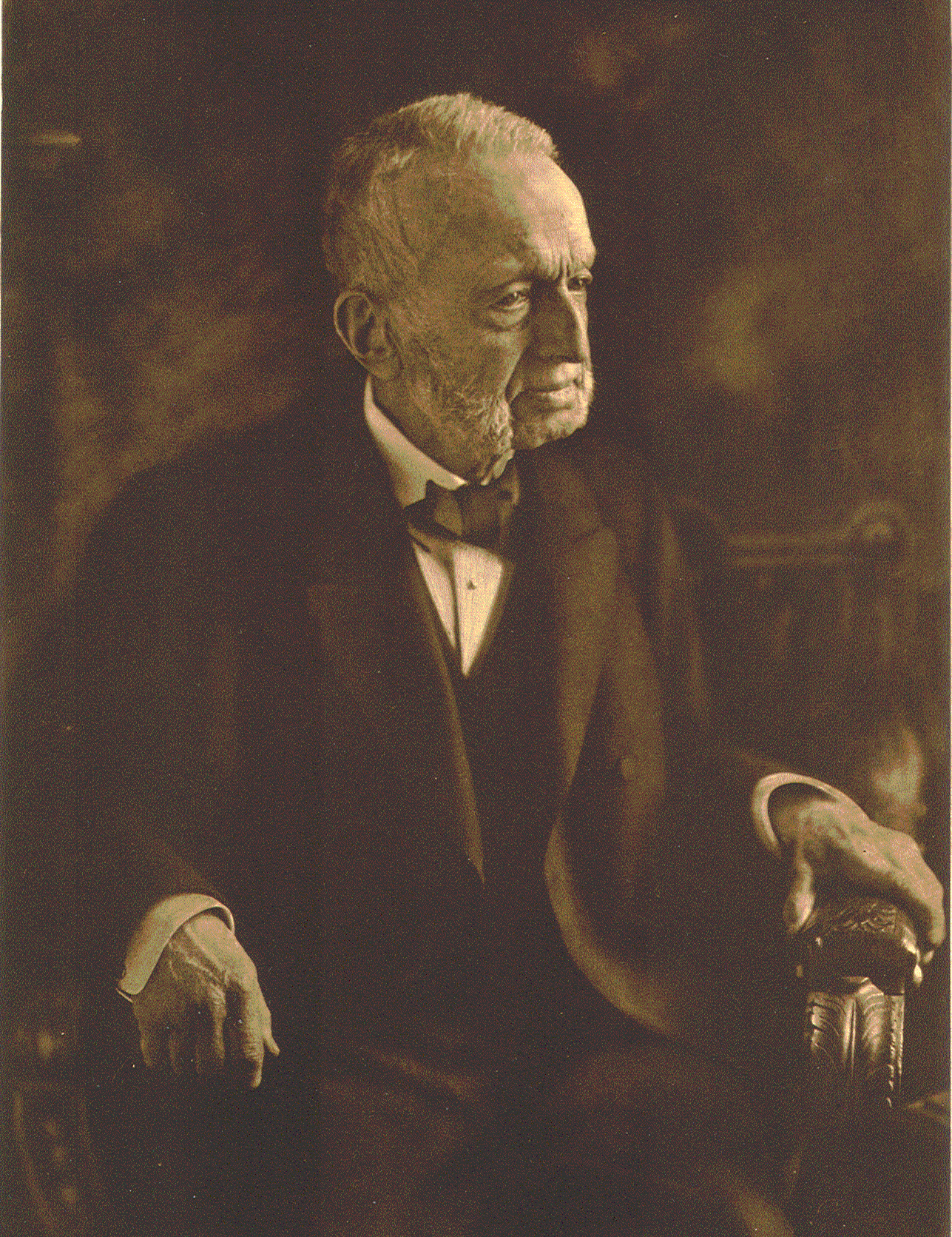 Wilhelm Amsinck (1821–1909), Hamburger Kaufmann und Reeder